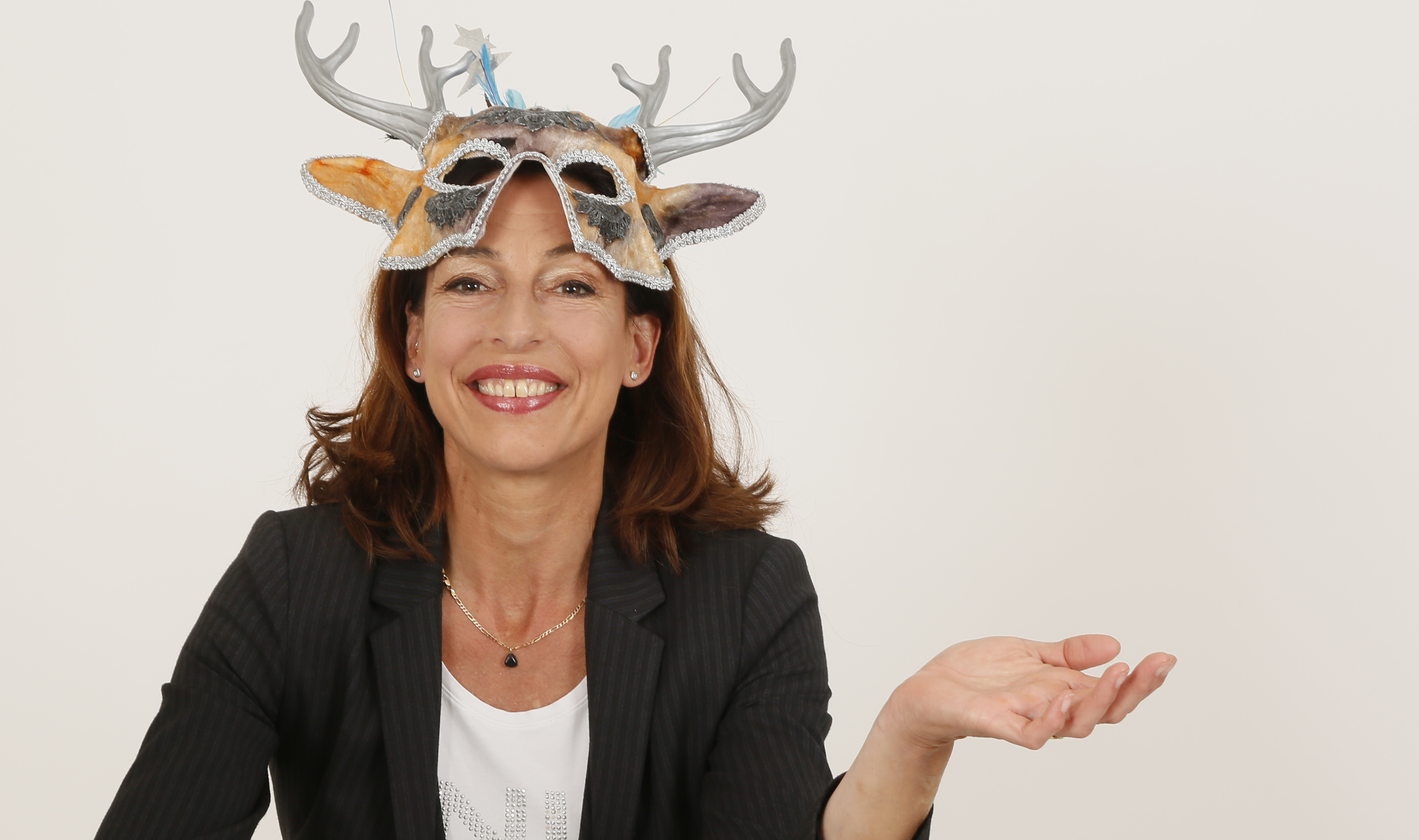 Andrea Volk ist eine Kabarettistin und Buchautorin aus Köln. Das Bild zeigt das Plakatmotiv ihres neuen Programms 'Feier-Abend! Büro und Bekloppte', das sich äußerst humorvoll mit dem Überleben im Digitalen Wandel 4.0 beschäftigt.